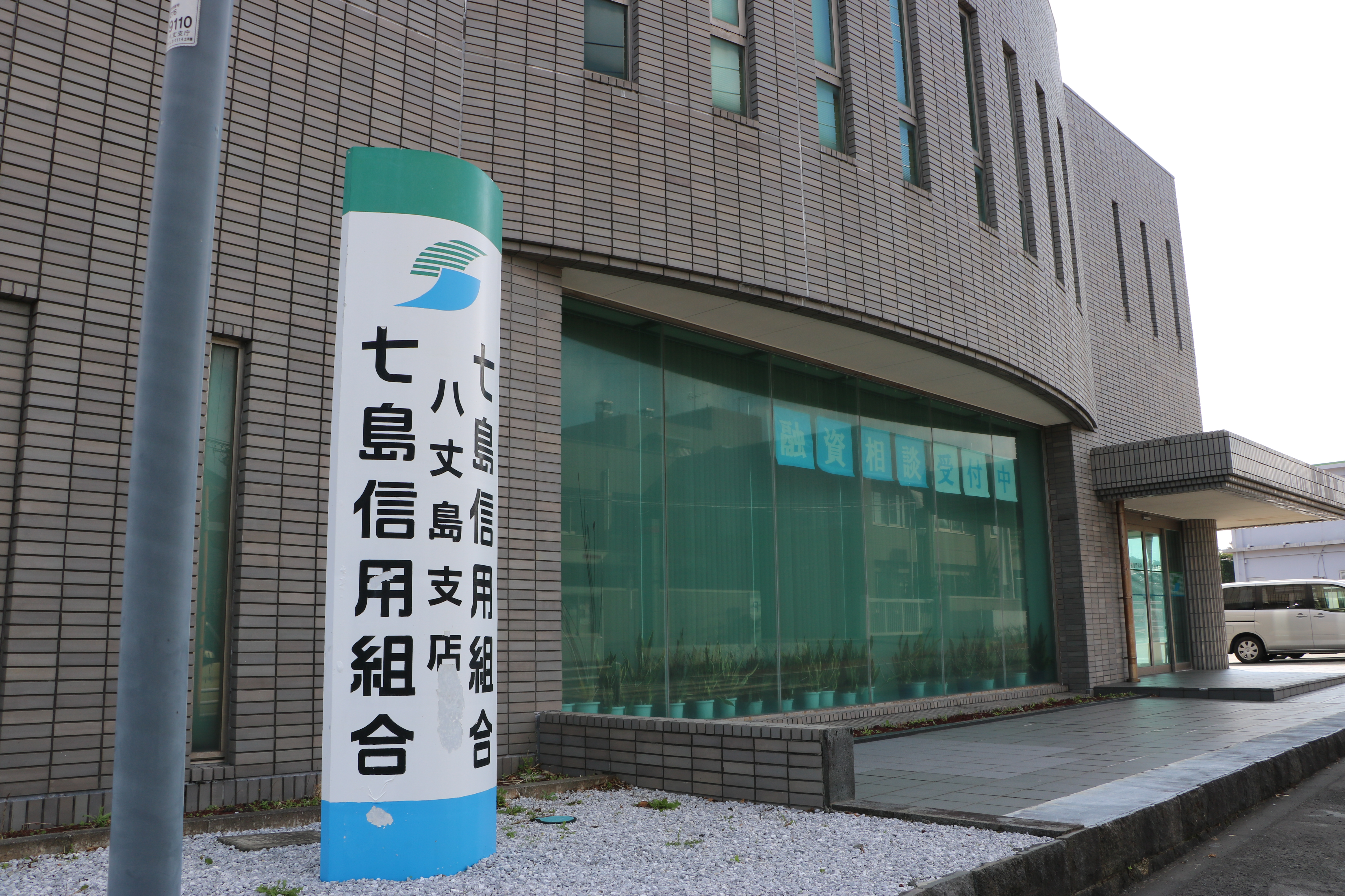 七島信用組合八丈島支店（東京都八丈町）